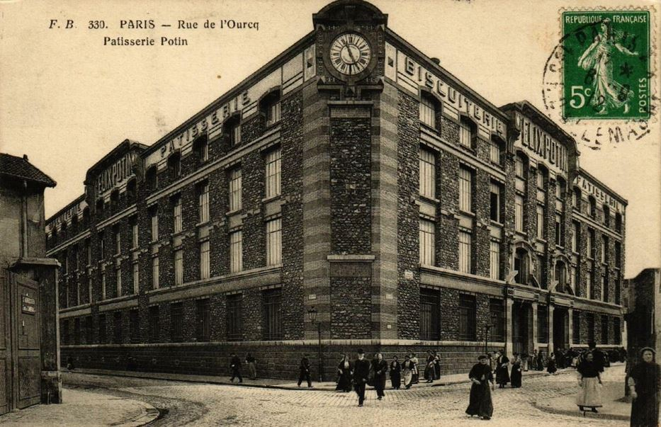 Paris.Rue de l'Ourcq.Pâtisserie Potin